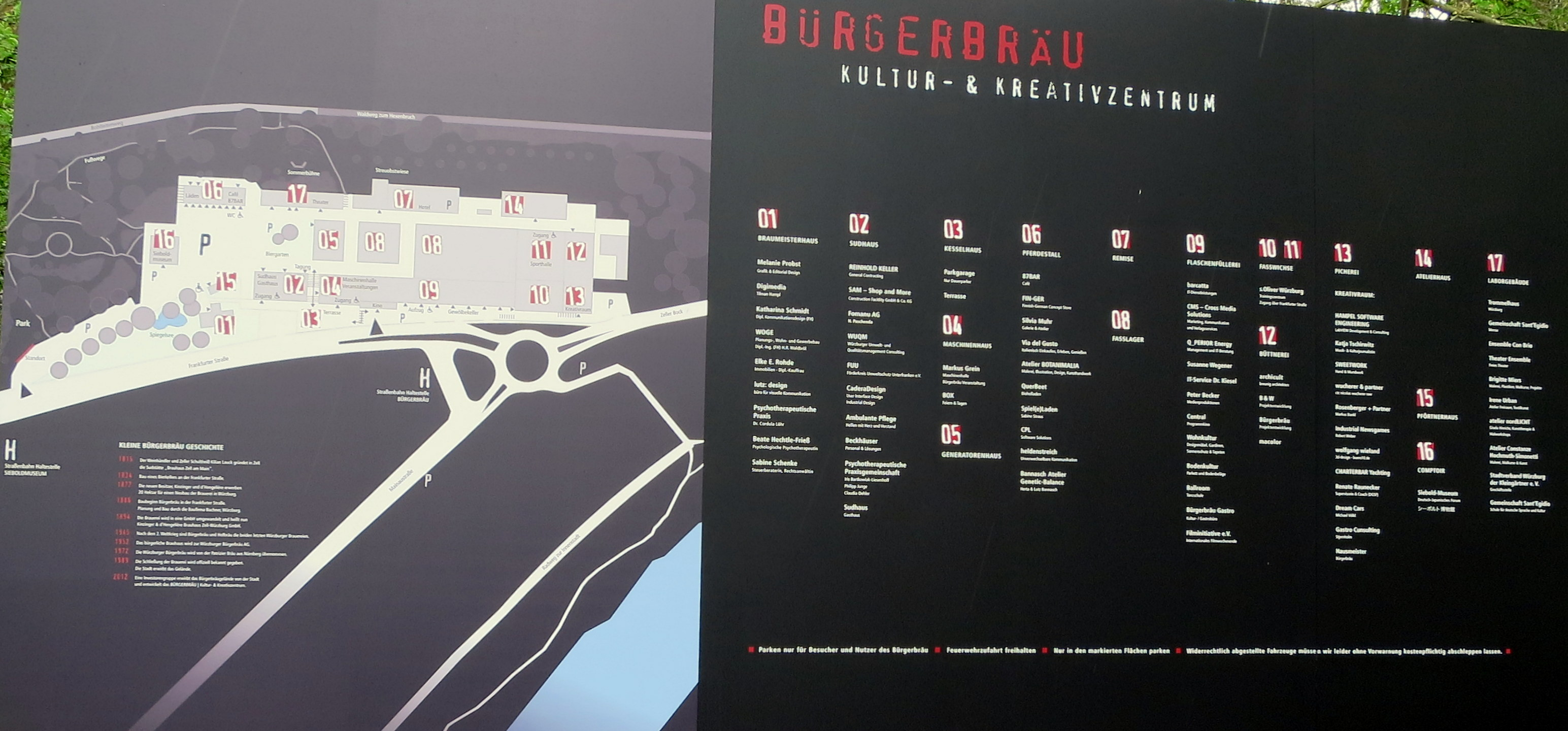 Bürgerbräu Areal, denkmalgeschützter Denkmalkomplex, jetzt Kultur- und Kreativzentrum